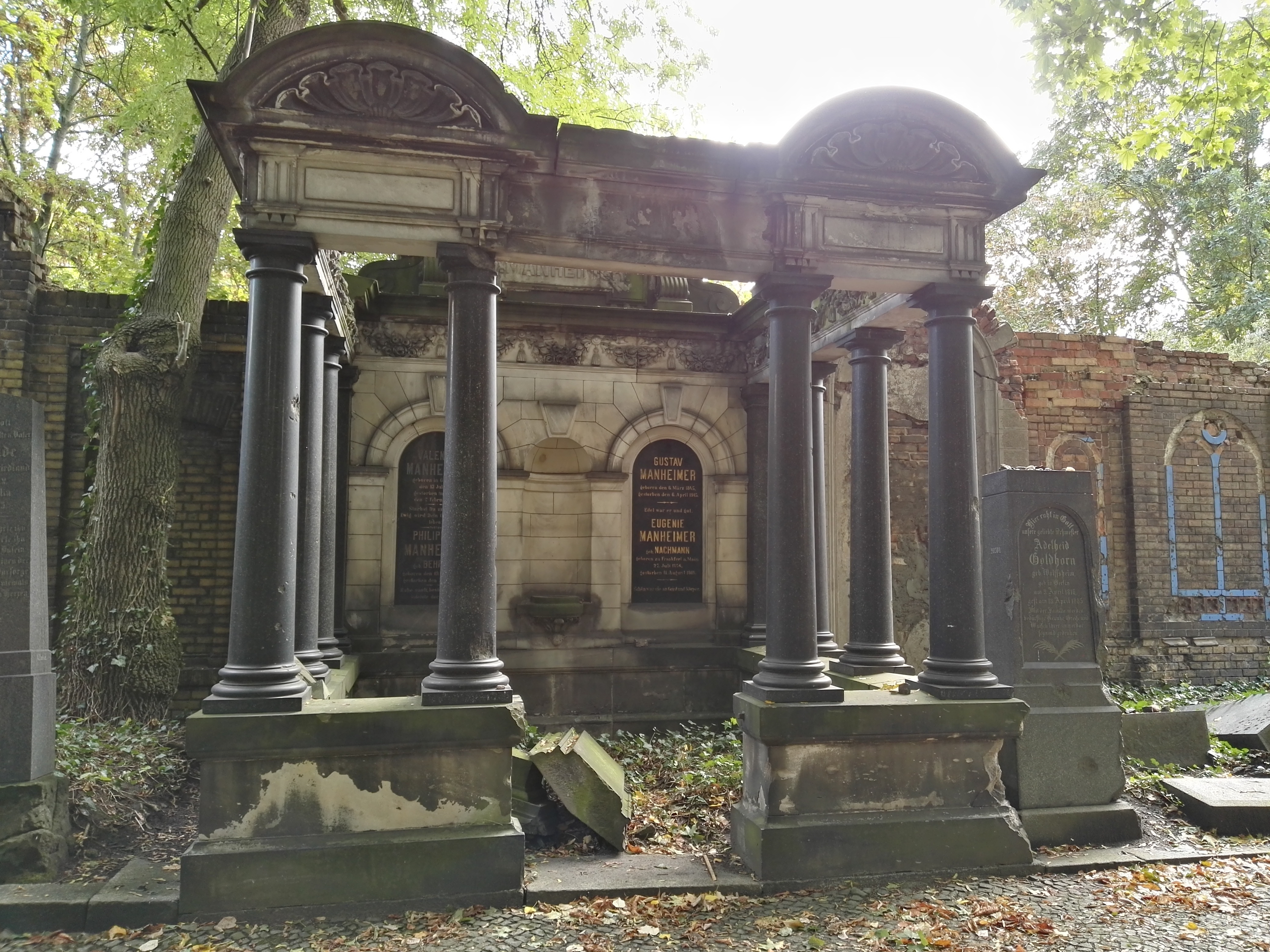 Grab von Valentin Manheimer auf dem Jüdischen Friedhof Schönhauser Allee